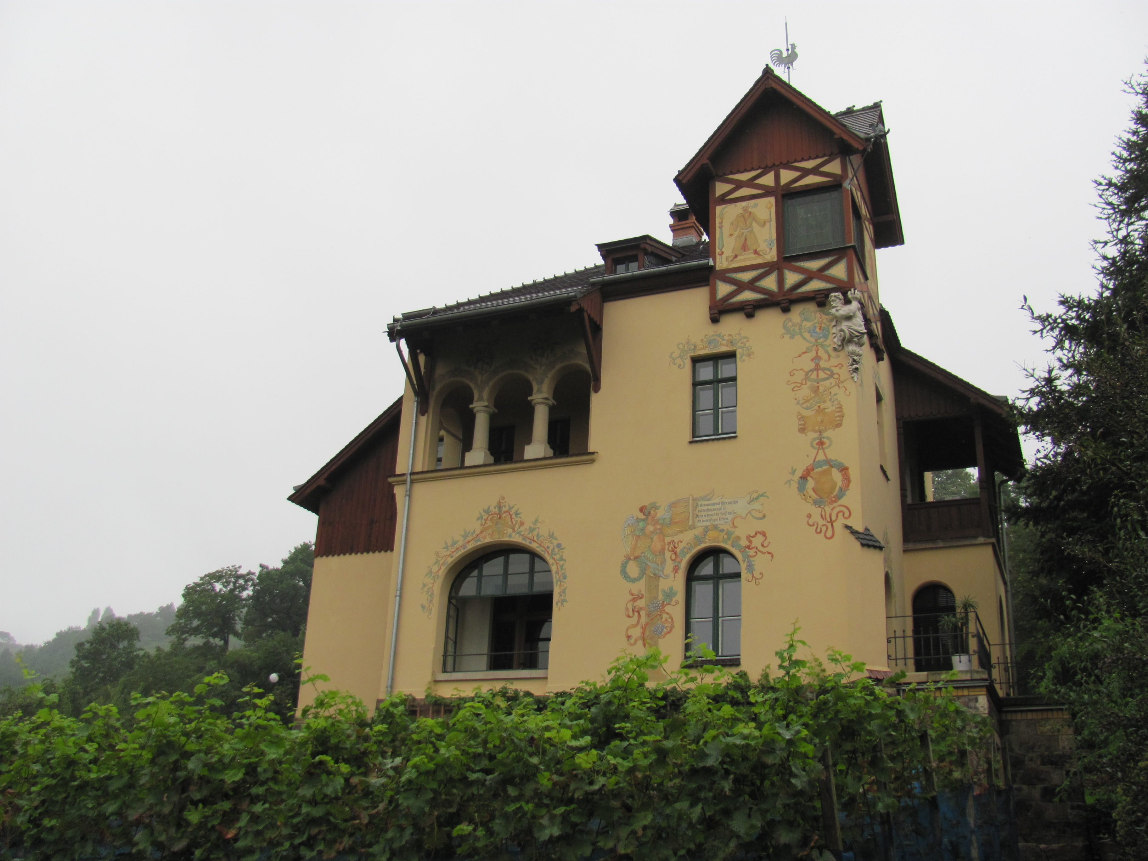 Radebeul Villa Oswald Haenel am Tag des offenen Denkmals 2014